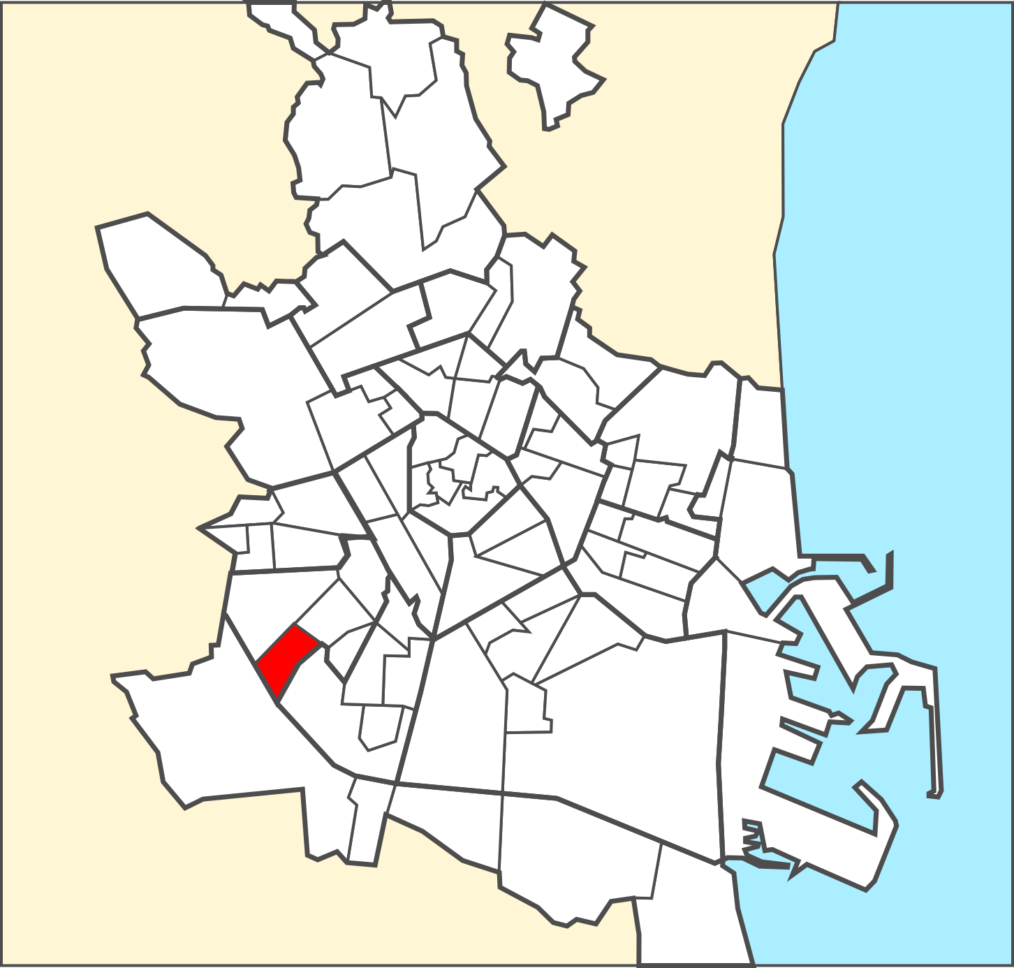 Localització del barri dins de la ciutat de València.